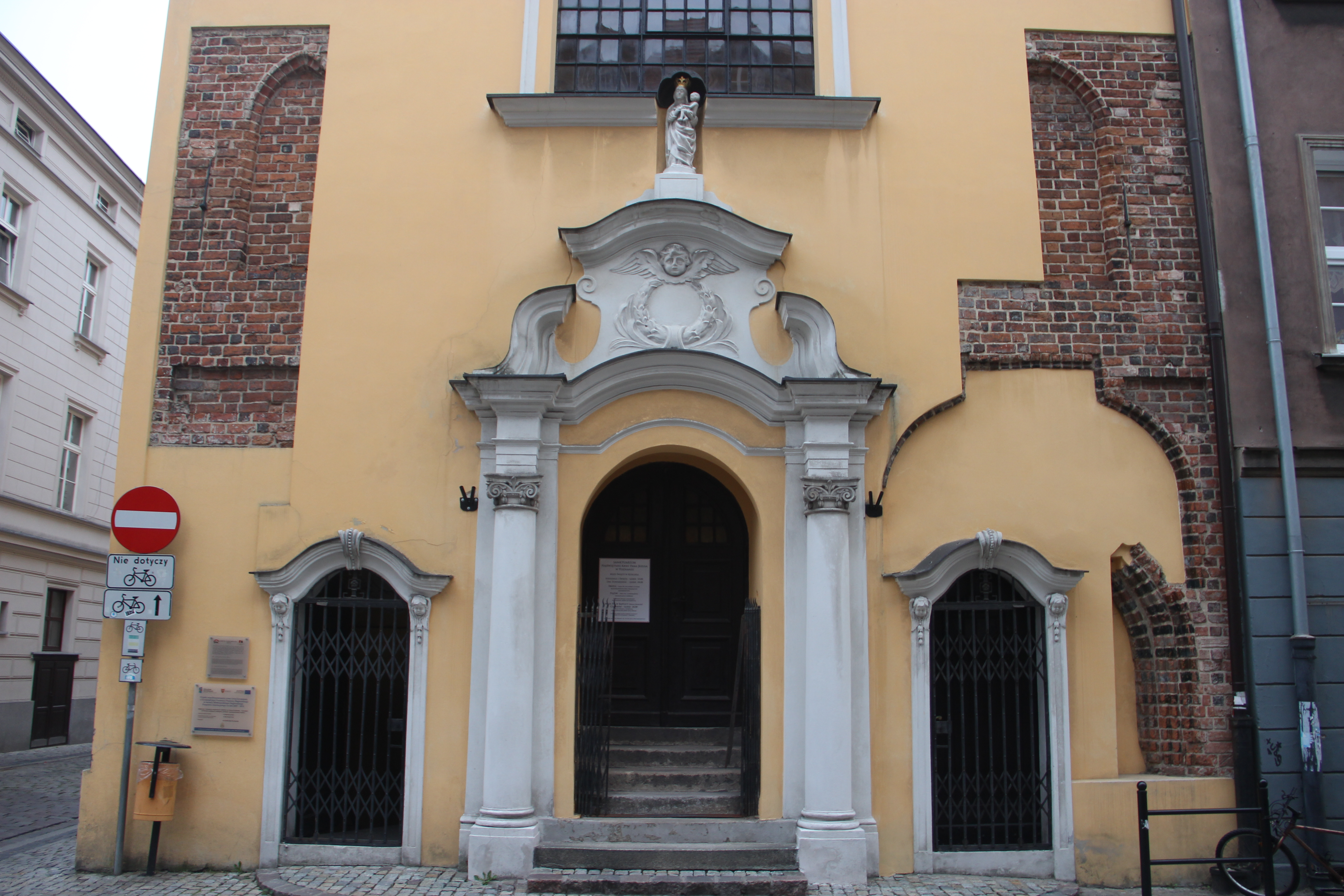 Kościół Najświętszej Krwi Pana Jezusa